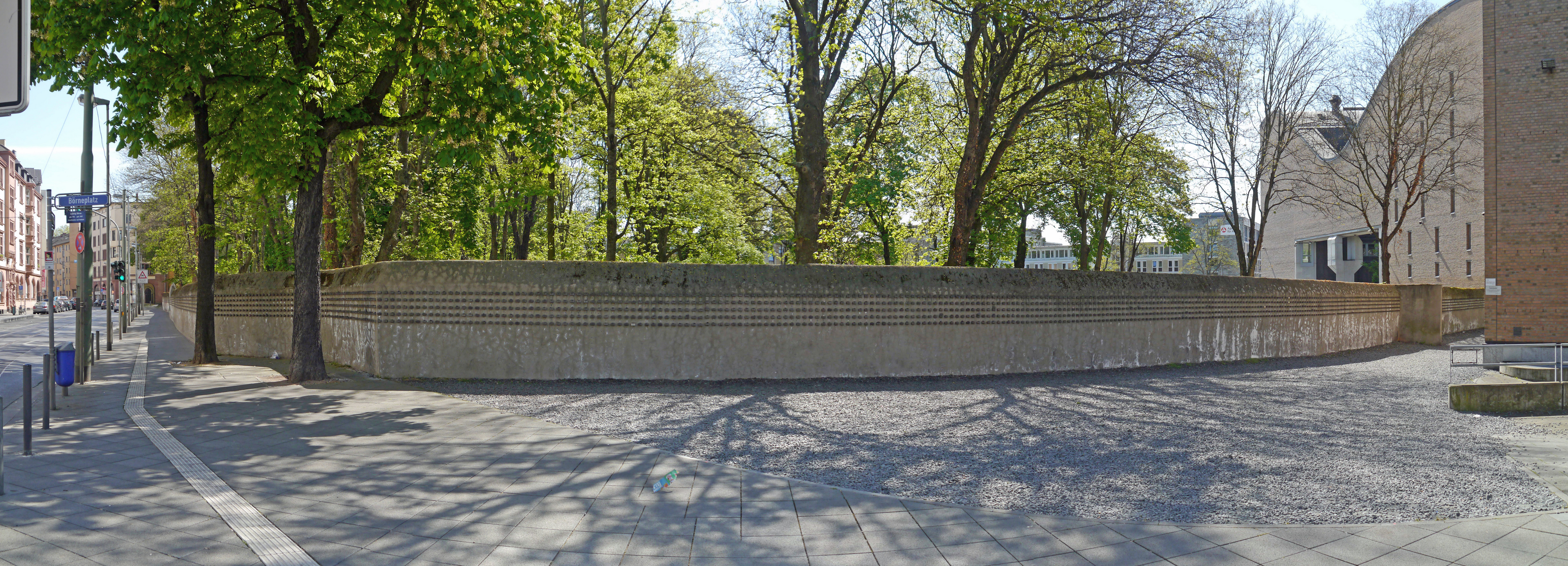 Der Alte Jüdische Friedhof an der Battonnstrasse. Ansicht von Westen in Frankfurt am Main.